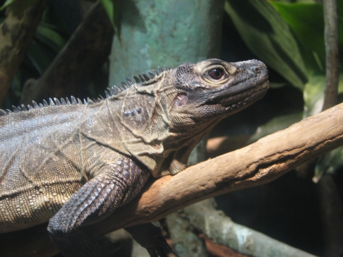 English - Philippine Sailfin Lizard Cebuano - Ibid